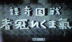 『戦国奇譚 気まぐれ冠者』、カットタイトル、1935年